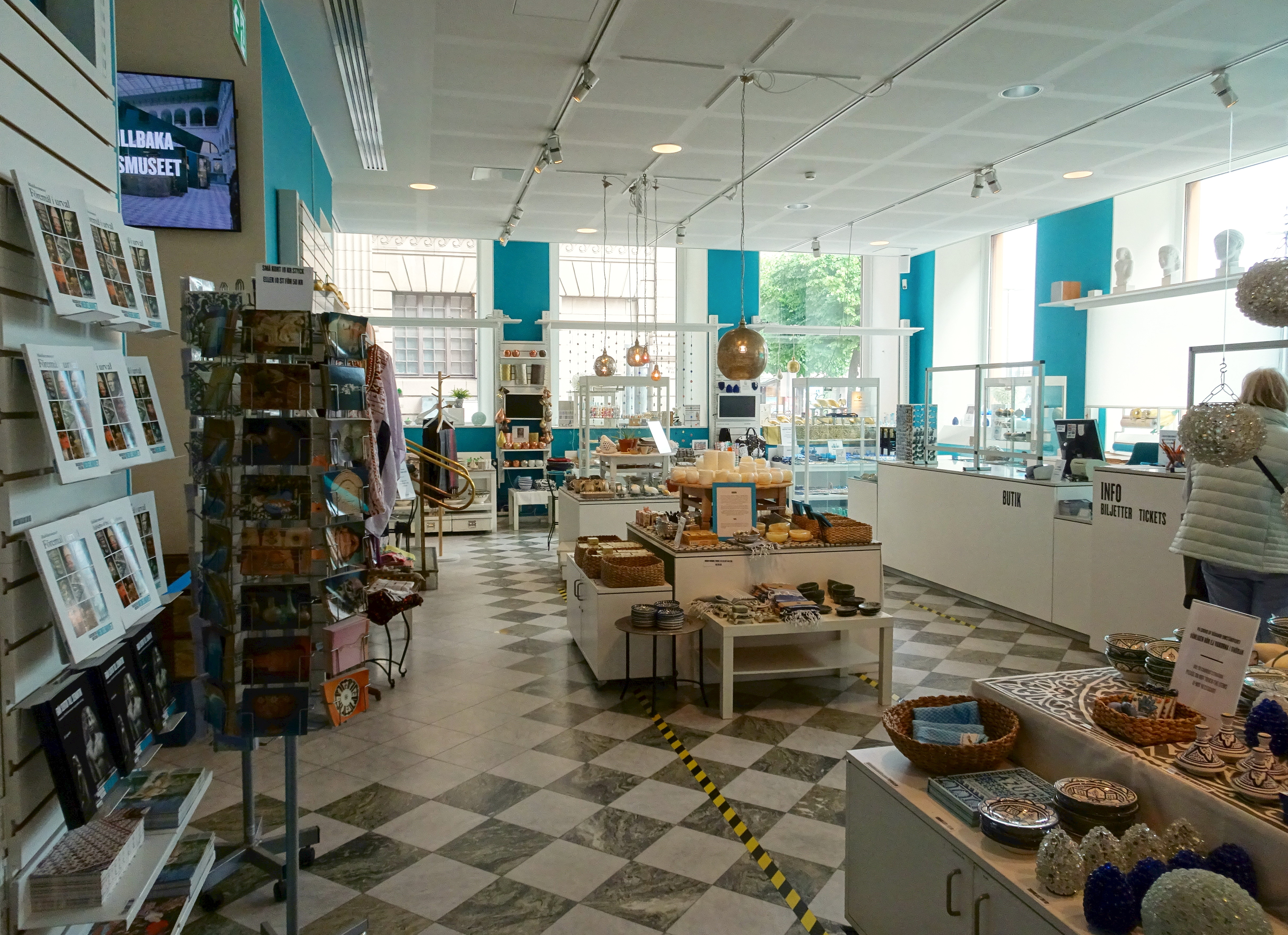 Museishop